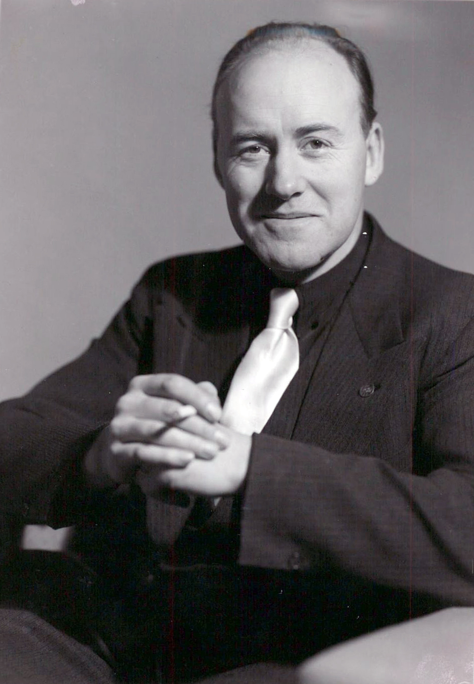 Tecknaren Einar Norelius.